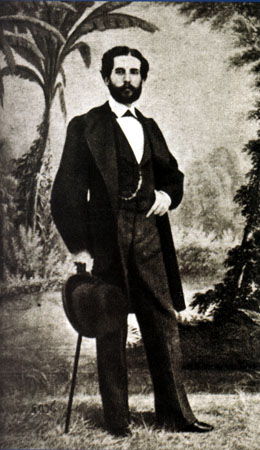 Gustavo Adolfo Bécquer, por el fotógrafo francés J. Laurent. Imagen tomada hacia 1865.